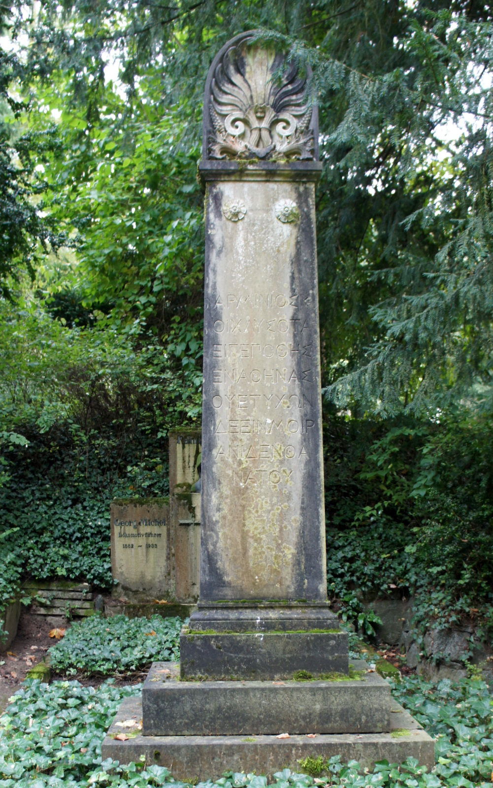 Koechlys Grab in Heidelberg